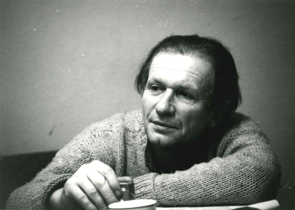 Der Schauspieler Hermann Beyer in einer Aufnahme des Berliner Fotografen Werner Bethsold.